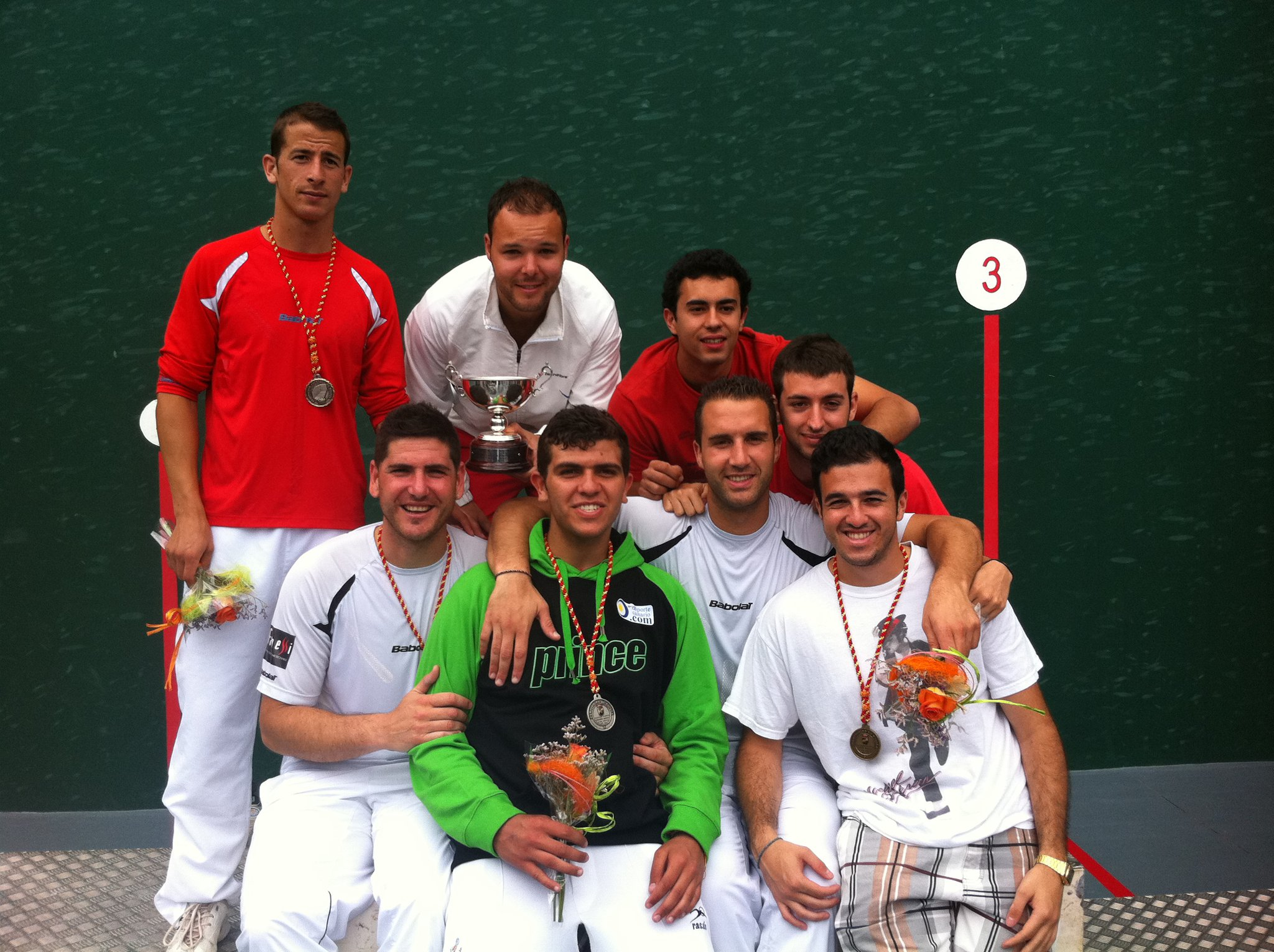 podium